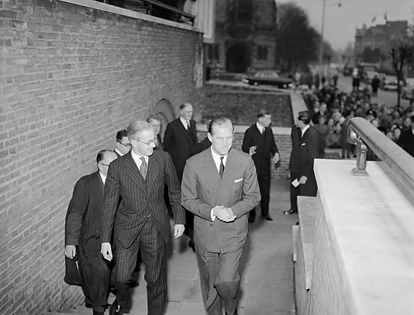 Teitl Cymraeg/Welsh title: Ymweliad brenhinol i Fangor gan Dywysog Phillip Ffotograffydd/Photographer: Geoff Charles (1909-2002) Dyddiad/Date: December 1, 1957 Cyfrwng/Medium: Negydd ffilm / Film negative Cyfeiriad/Reference: (gch13278) Rhif cofnod / Record no.: 3369649 Rhagor o wybodaeth am gasgliad Geoff Charles yn Llyfrgell Genedlaethol Cymru More information about the Geoff Charles Collection at the National Library of Wales